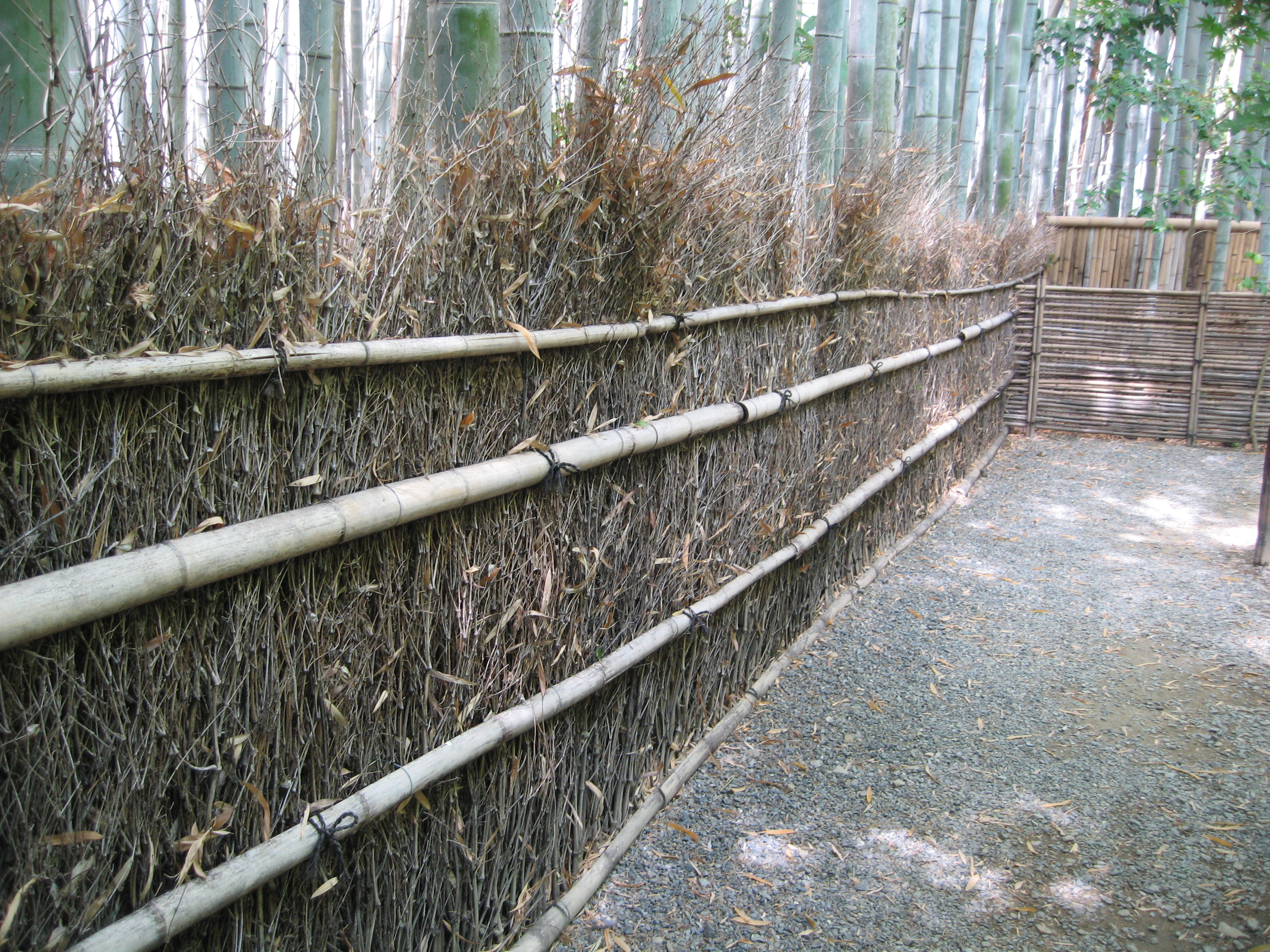 日本の竹垣、竹穂垣